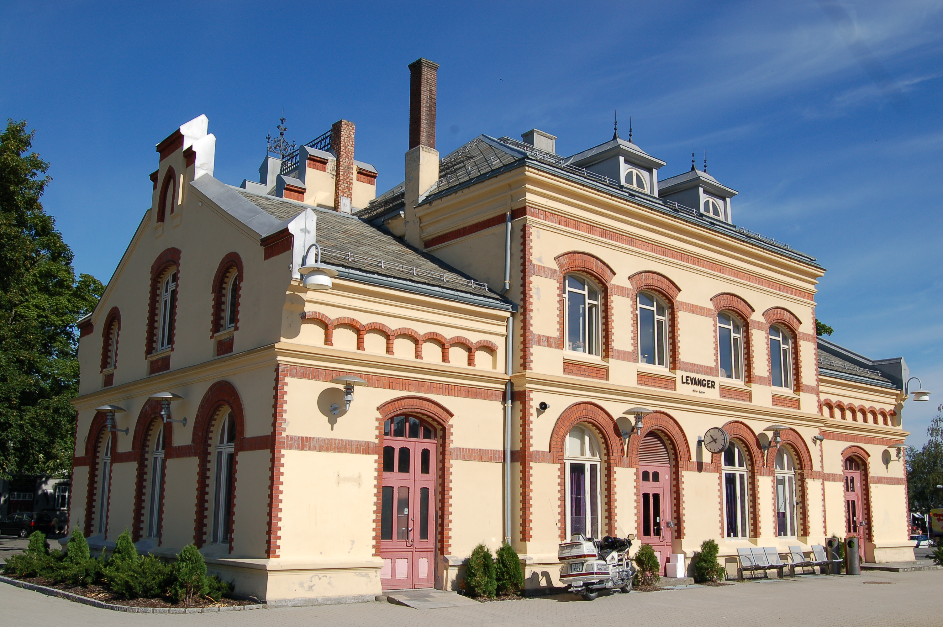 Levanger stasjon